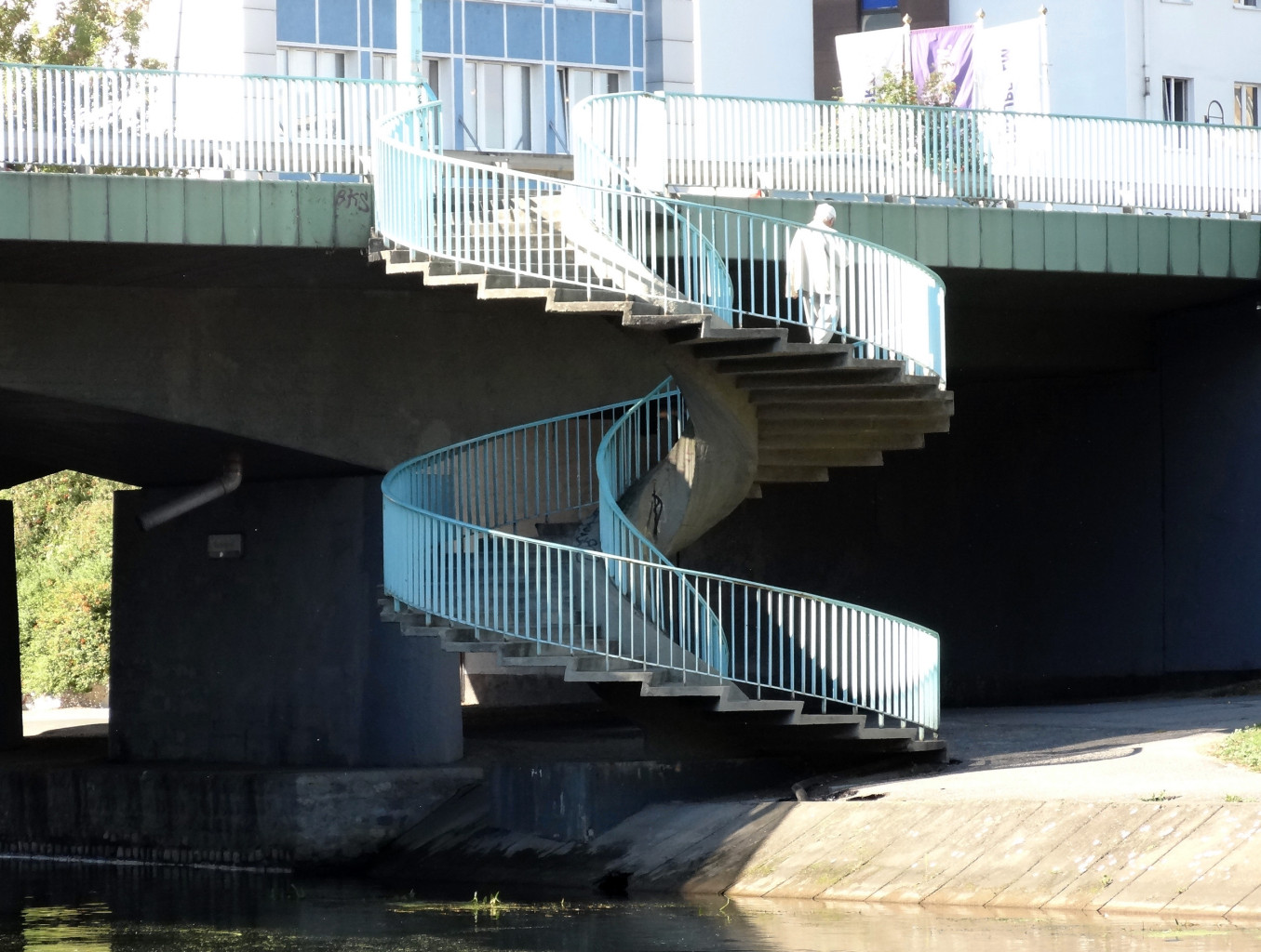 Most Bernardyński w Bydgoszczy